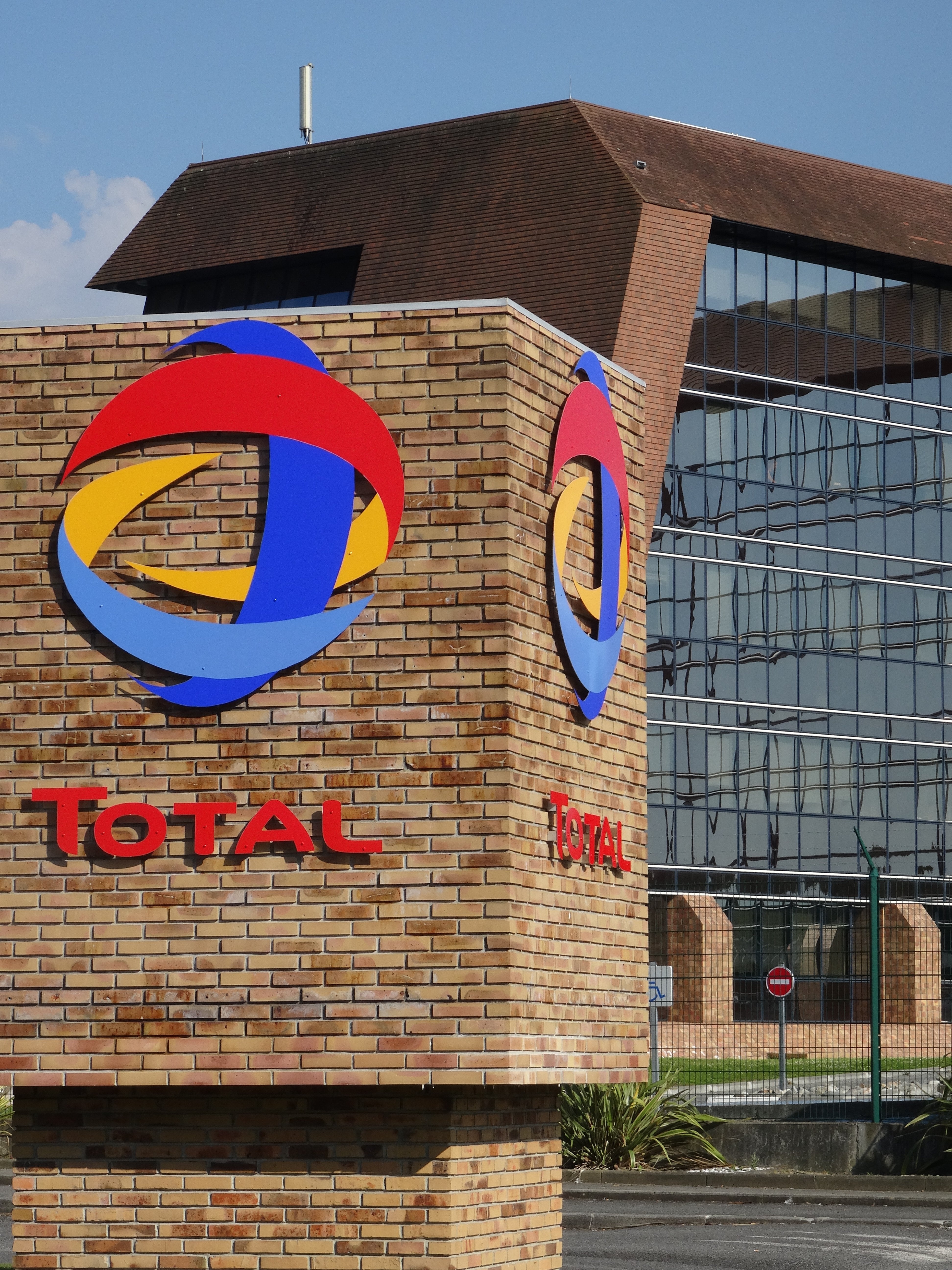 Centre Scientifique et Technique Jean-Féger à Pau